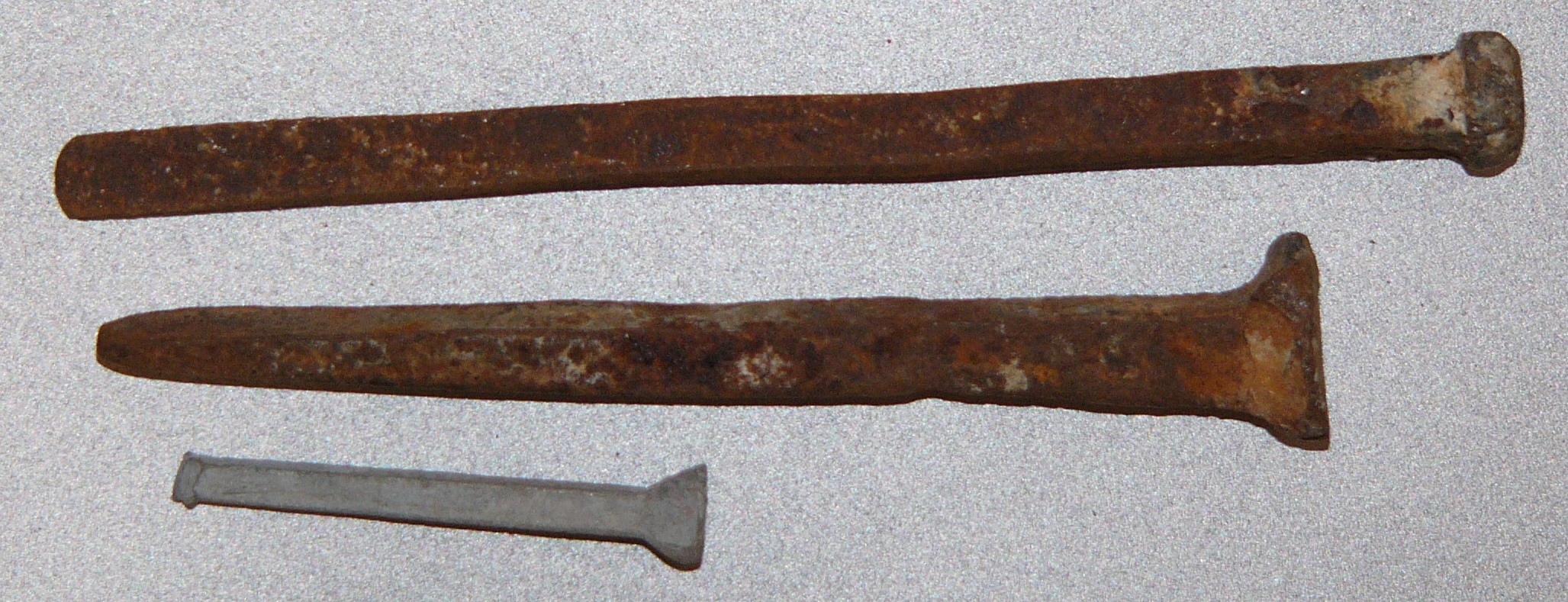 Clous carvelle pour aide GIMP Auteur : Rv